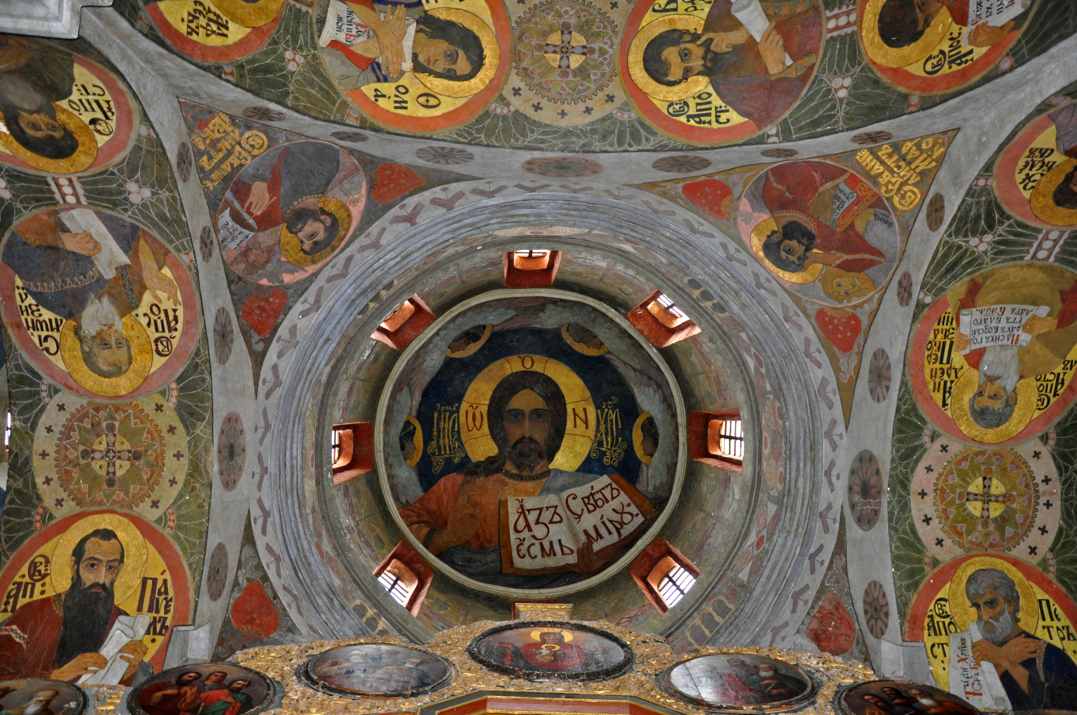 Розпис головного купола. Церква Всіх Святих Києво-Печерської лаври. Внутрішній вигляд барабану головного купола